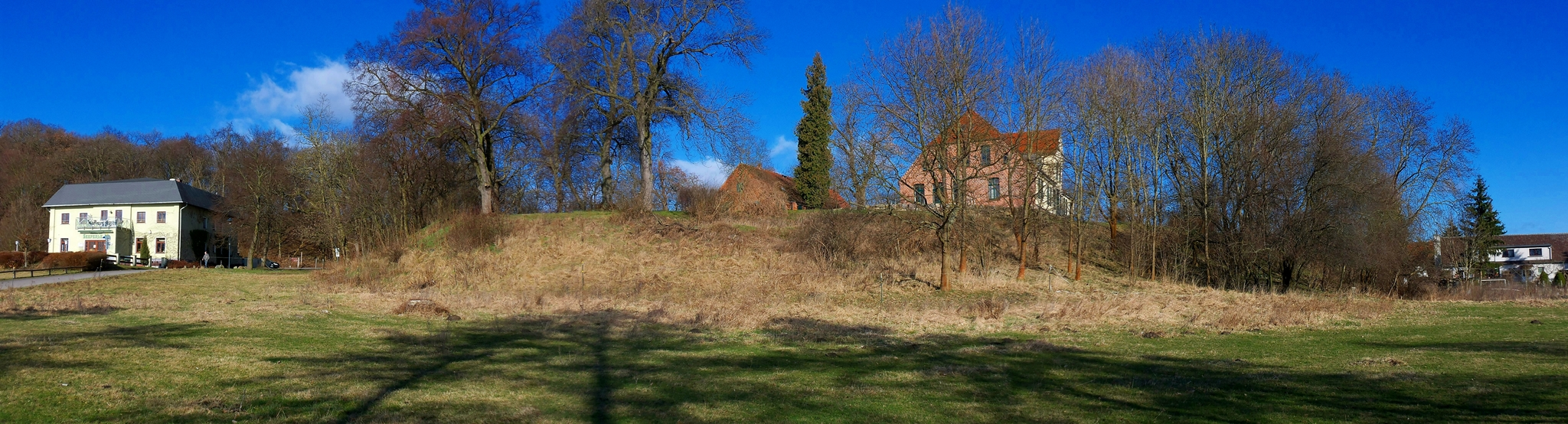 Klosterhügel Broda in Panorama